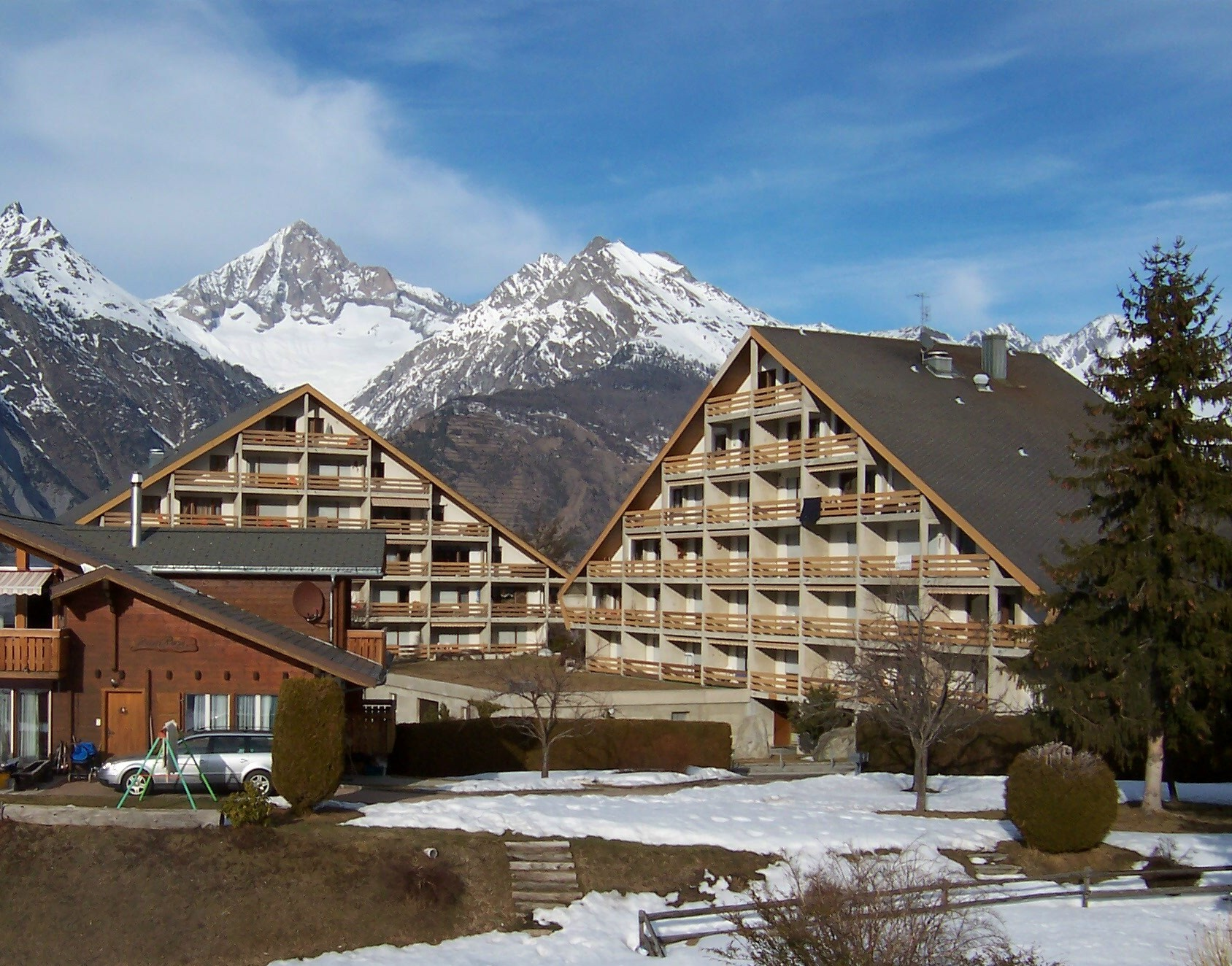 Haus Nesthorn mit modernen Ferienwohnungen in Unterbäch